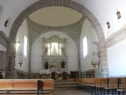 Fotografía del interior de la ermita de la Virgen del Castillo de Vilvestre.